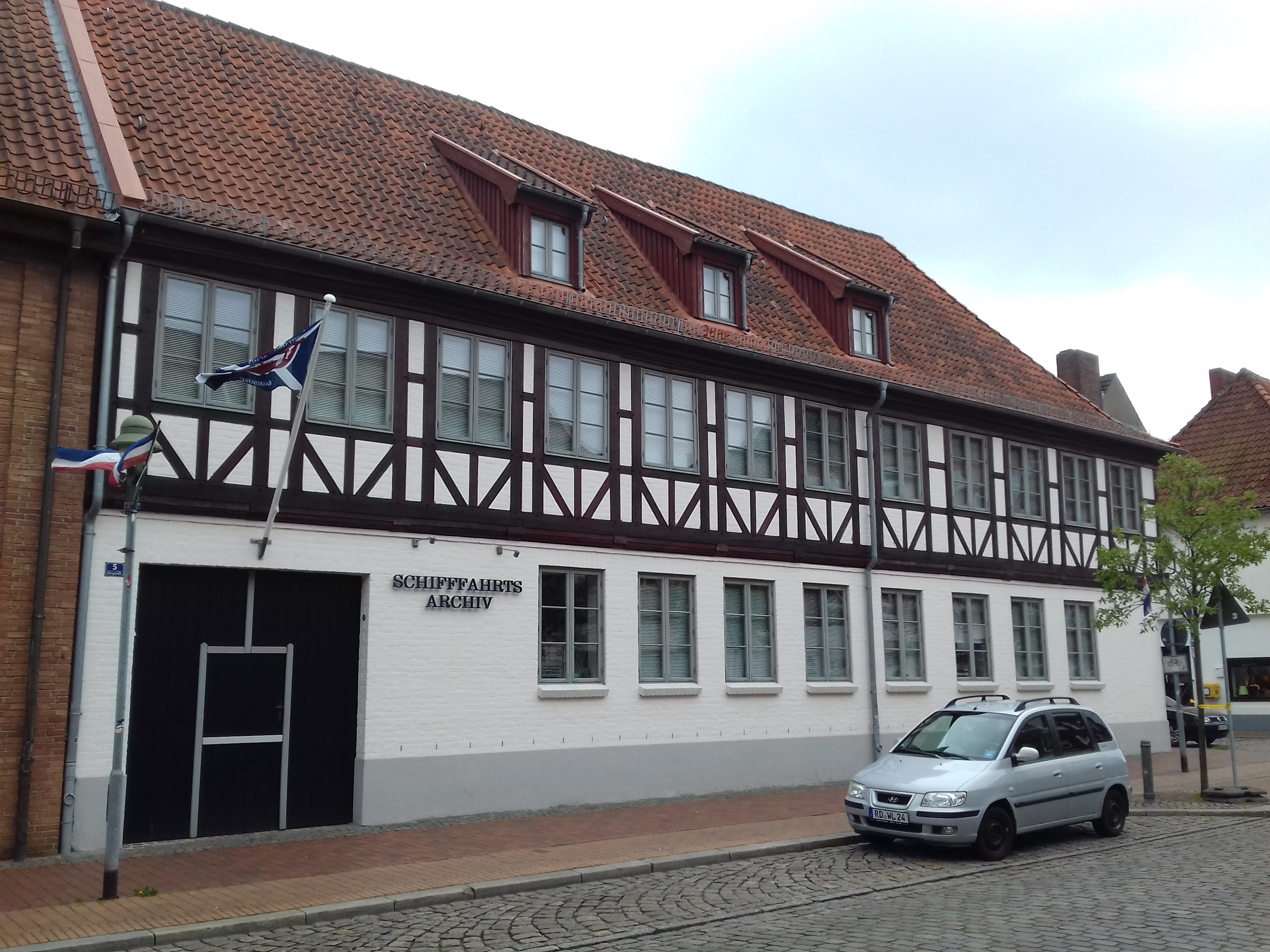 Rendsburg, Königstr. 5 Gebäude des Schifffahrtsarchiv